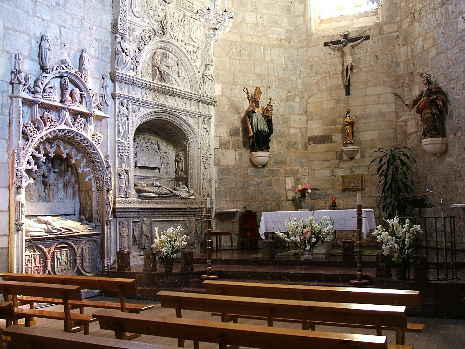 Cabecera de la iglesia del Convento de Santa Dorotea (siglo XV, MM Canónigas Agustinas), en Burgos, España